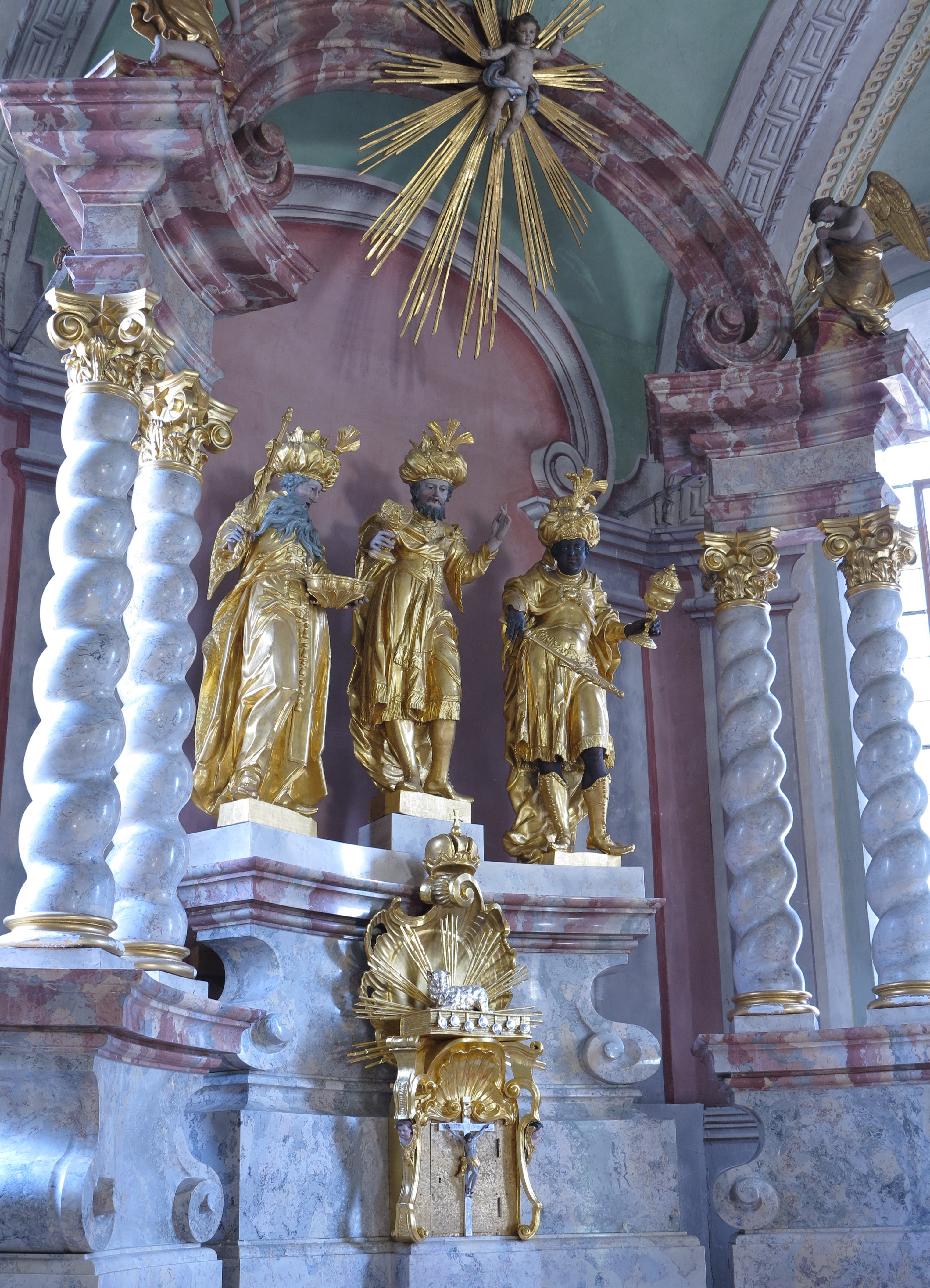 Neuer Hochaltar mit den Hll. Drei Königen in der Pfarrkirche in Elemn von Joseph Georg Witwer, um 1774